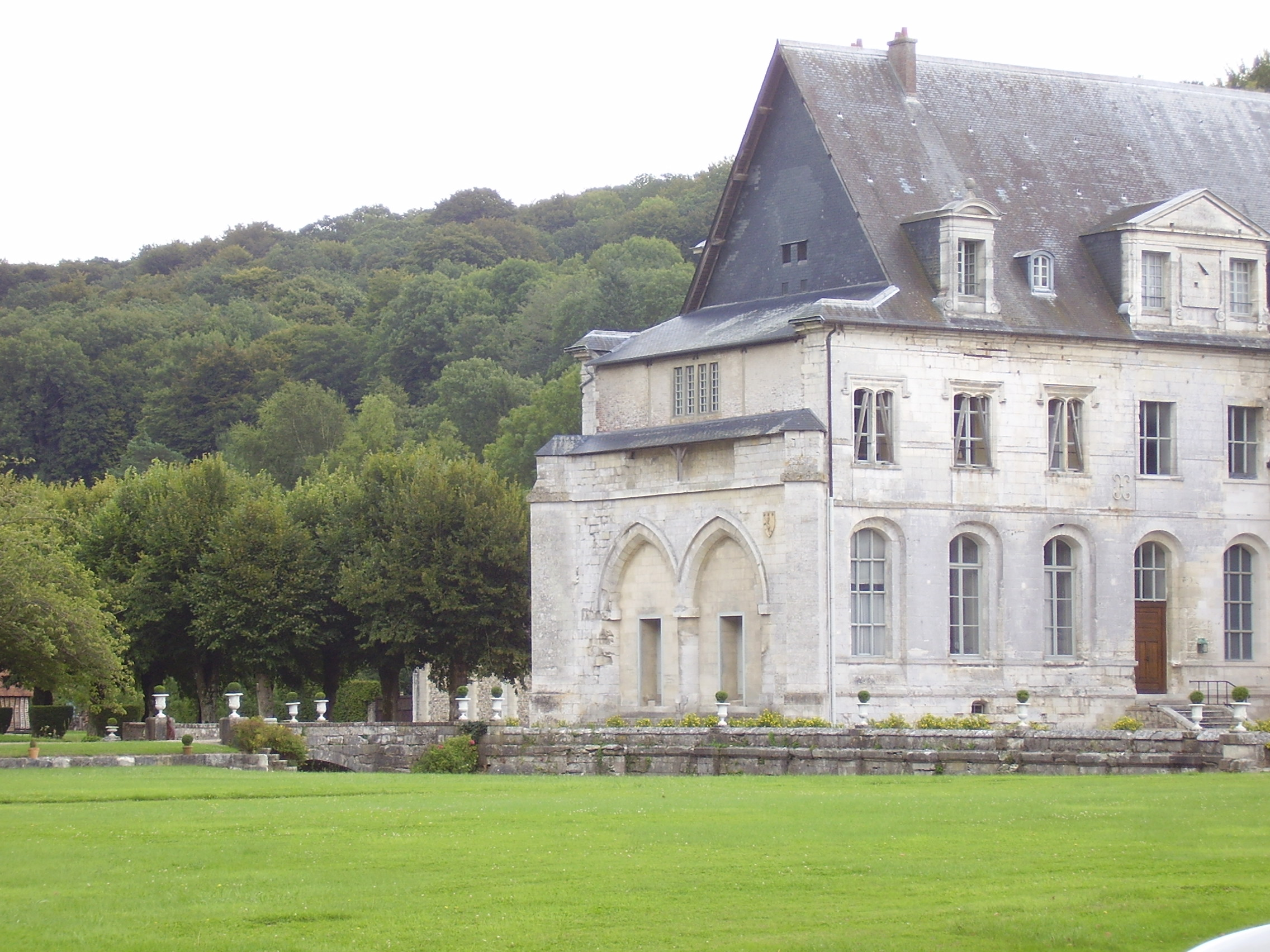 Abbaye de Saint-Wandrille de Fontenelle, France